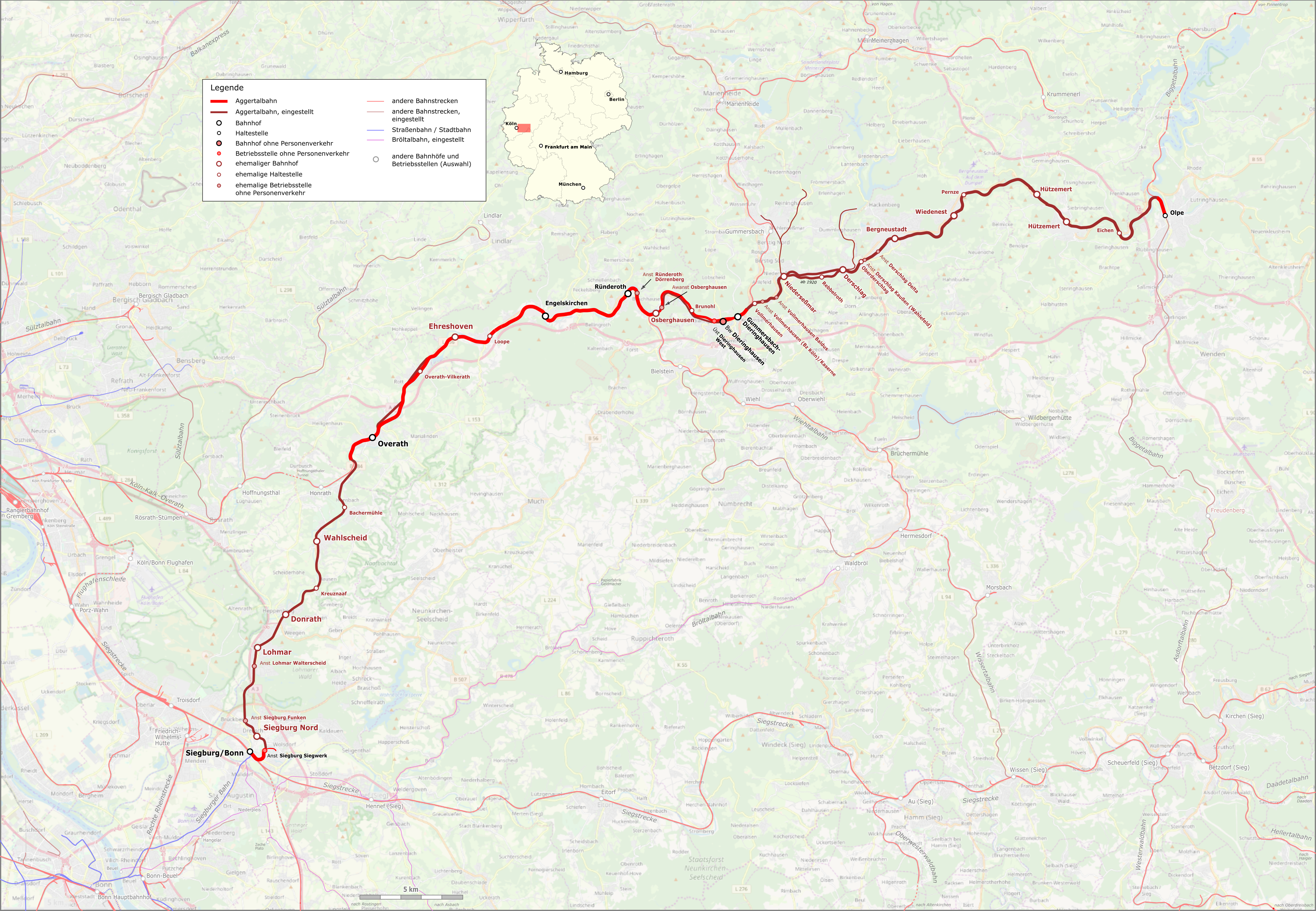 Verlauf der Aggertalbahn